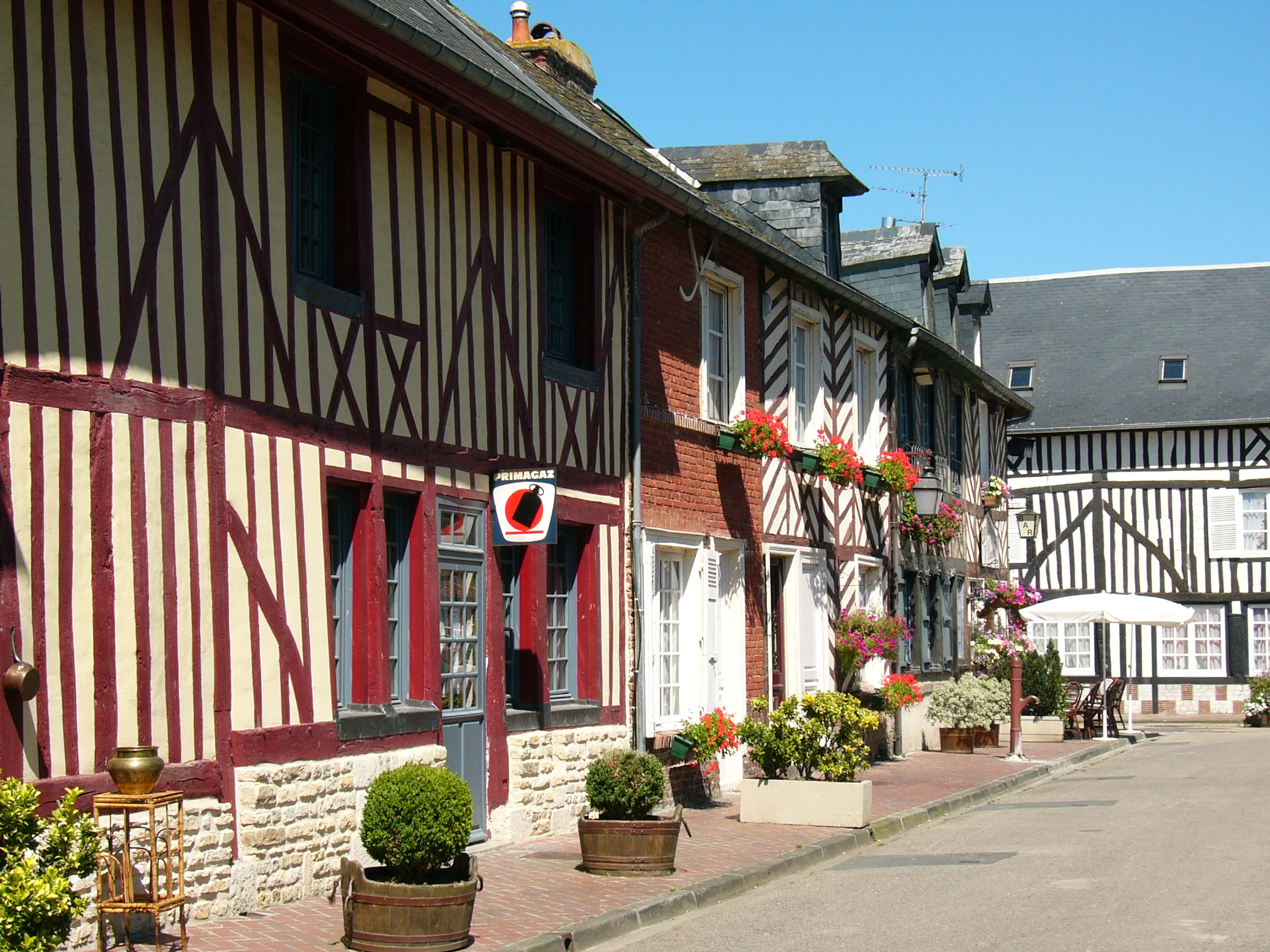 Beuvron-en-Auge, Calvados, Basse-Normandie, France